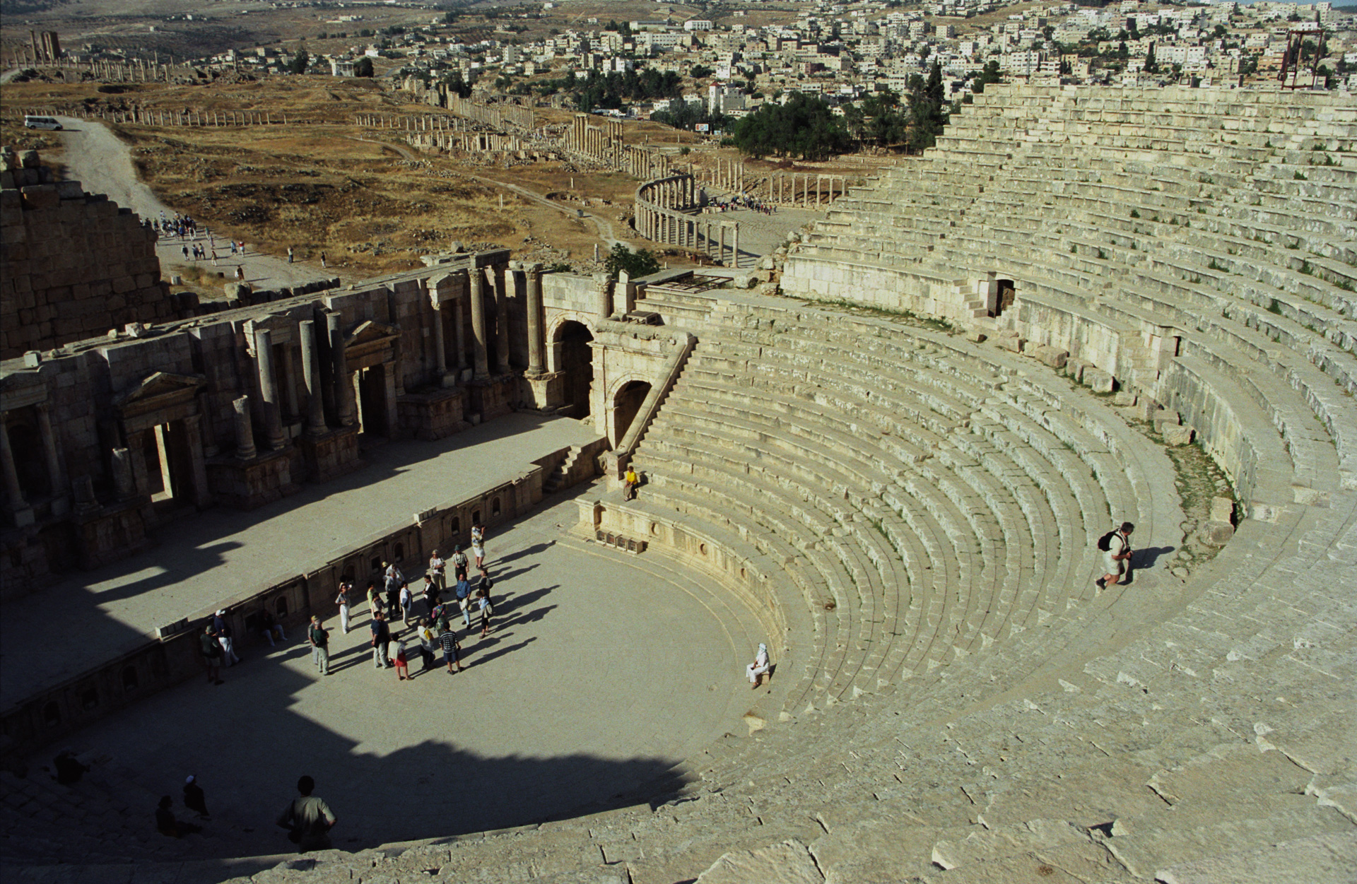 Jerash, Jordan